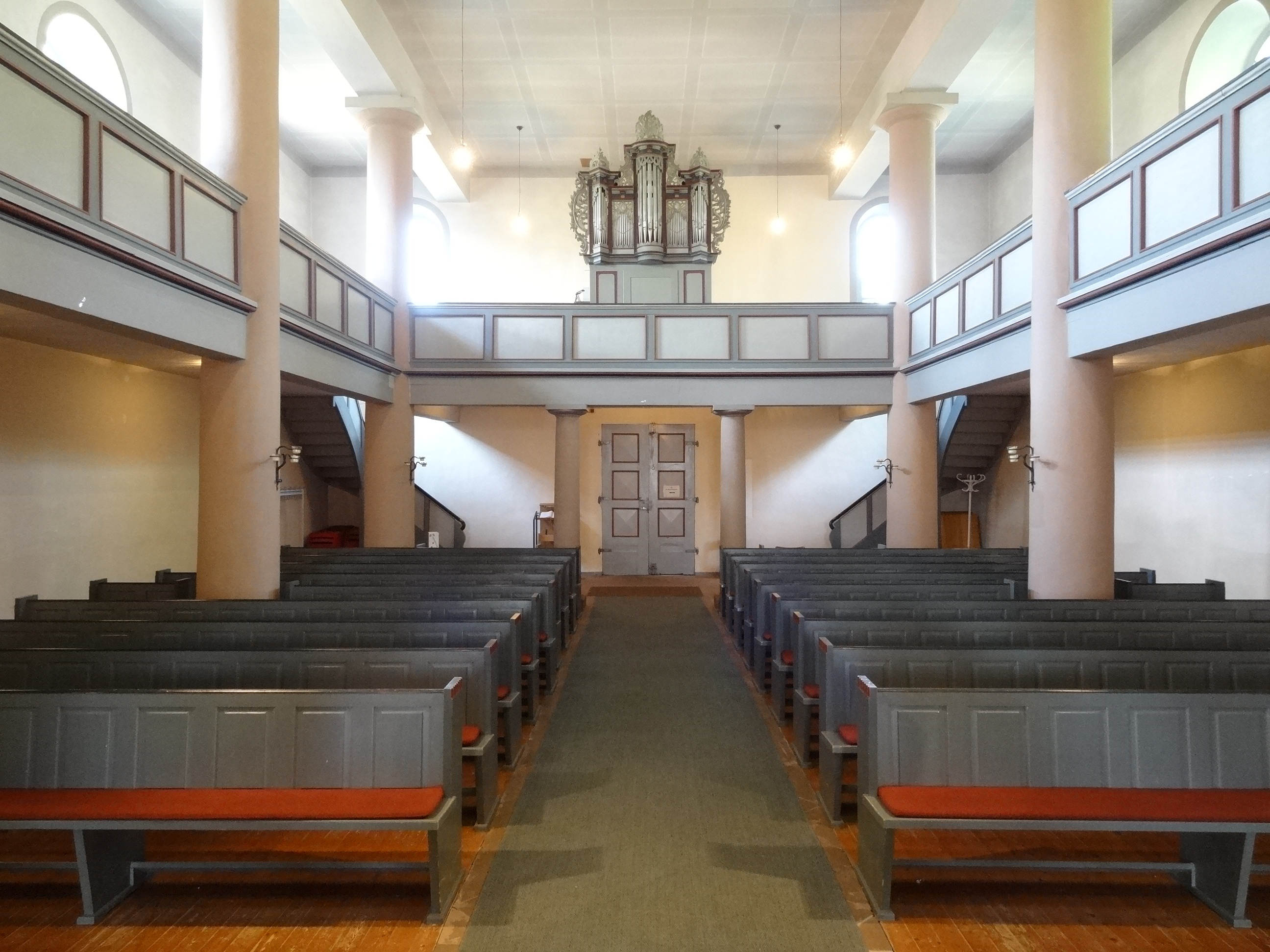 Evangelische Pfarrkirche (Münster, Butzbach)